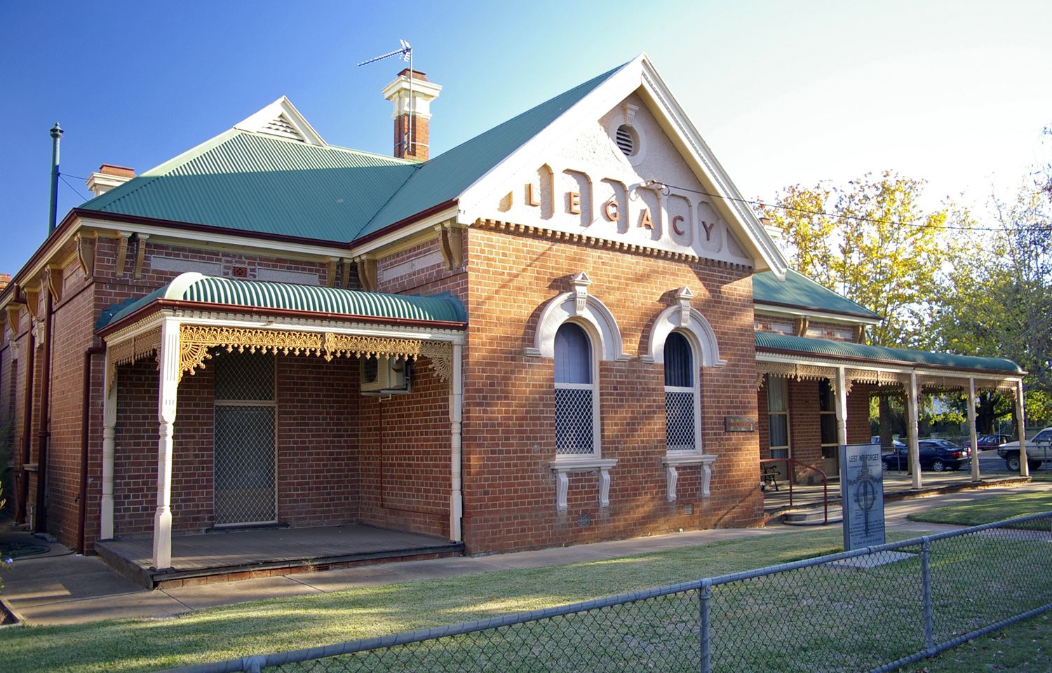 Legacy Australia, Wagga Wagga Branch.